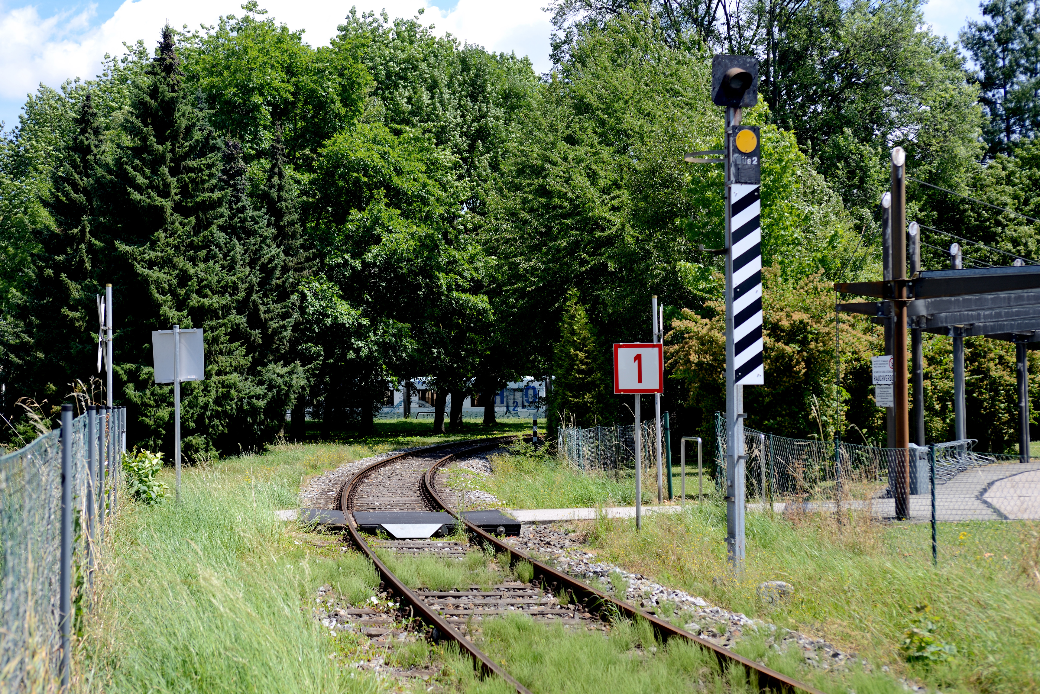 EK Km 5.593 zwischen dem Bahnhof Linz Urfahr und der Donaubrücke.